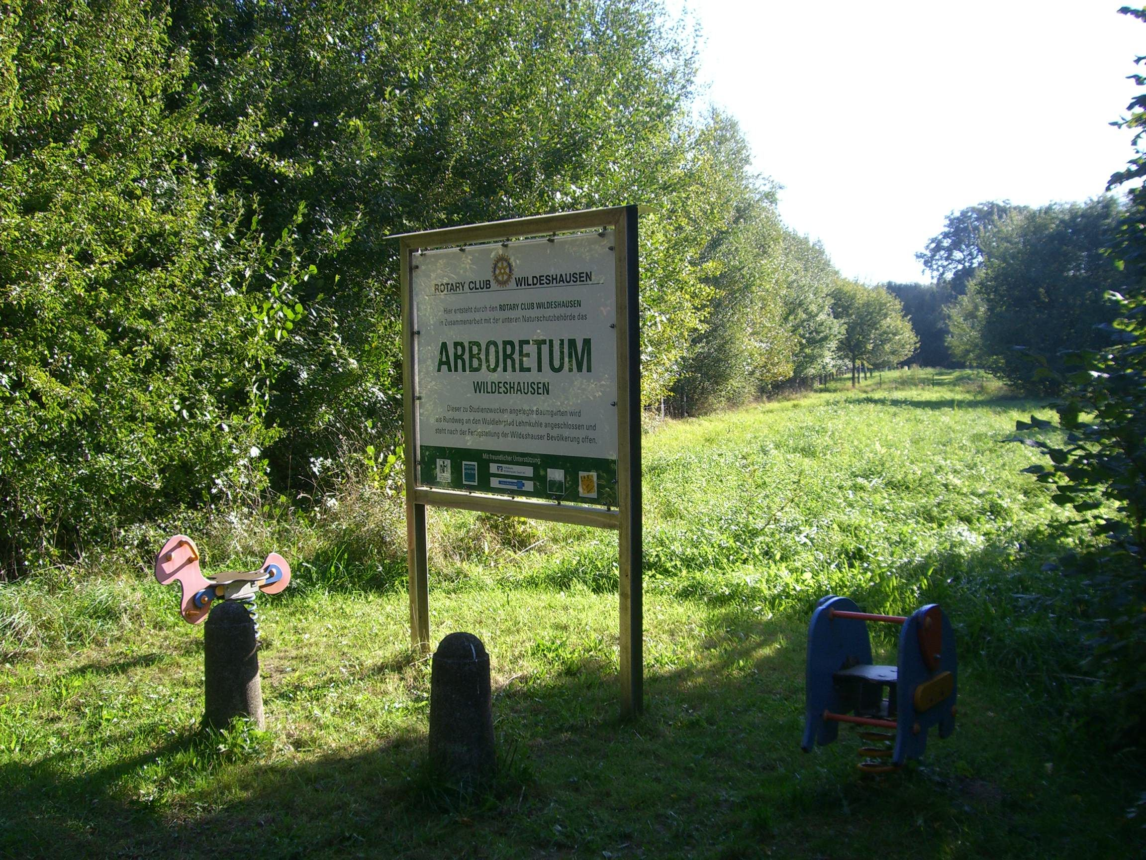 Arboretum Wildeshausen Schild